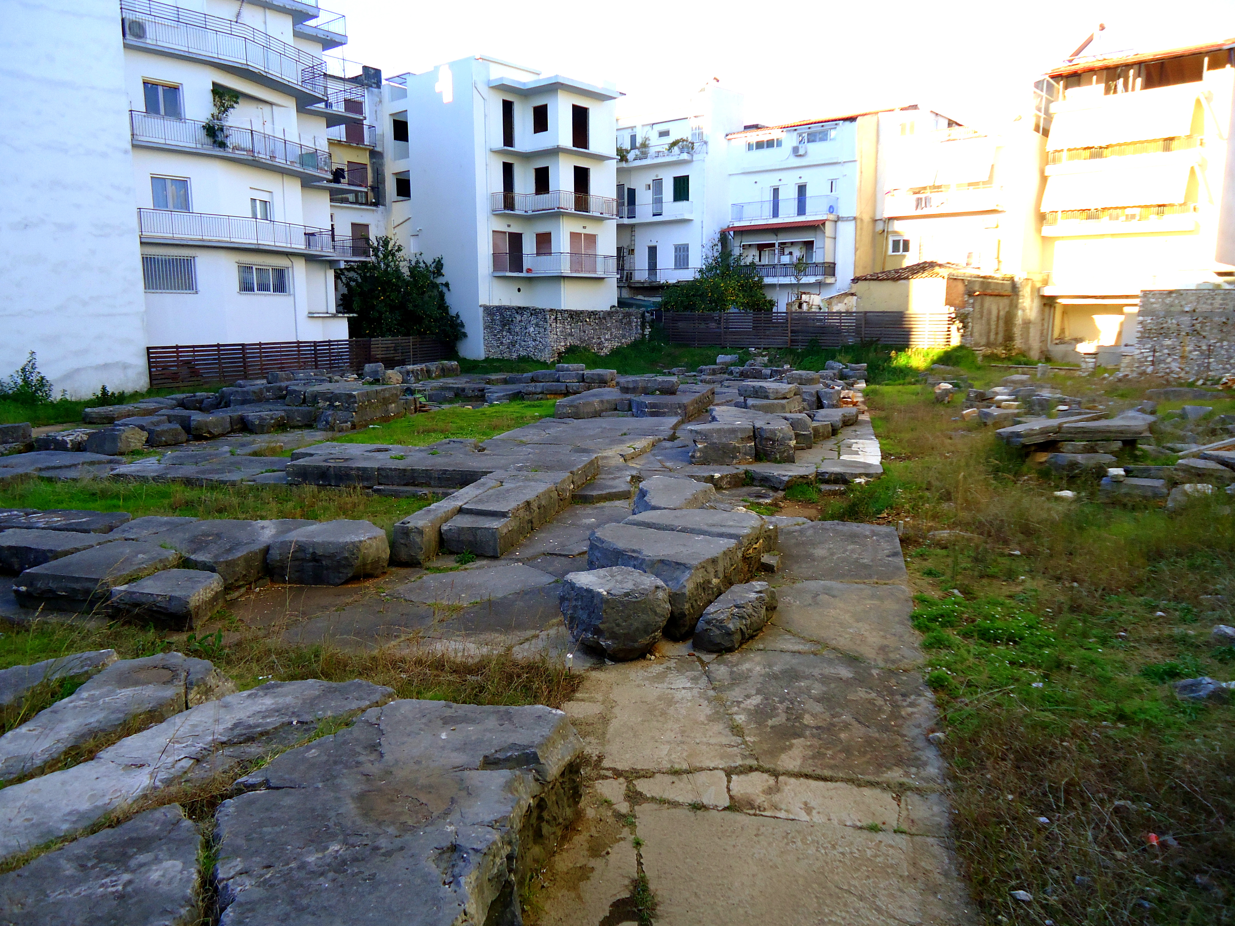 Ο σημαντικότερος ναός της αρχαίας Αμβρακίας, που ήταν αφιερωμένος στον Απόλλωνα Πύθιο Σωτήρα και δέσποζε στο δημόσιο χώρο της πόλης, βρίσκεται στο κέντρο της Άρτας, κοντά στην πλατεία Κιλκίς. Χρονολογείται γύρω στο 500 π.Χ., με βάση πώρινα αρχιτεκτονικά μέλη, που βρέθηκαν διάσπαρτα στον περιβάλλοντα χώρο, ωστόσο στην ίδια θέση πρέπει να υπήρχαν και παλαιότερα ιερά του Απόλλωνα. Στο ναό αυτό, που ήταν το κύριο ιερό της πόλης, φαίνεται ότι οι αρχές ανέθεταν τα δημόσια κείμενα, όπως προκύπτει από την εύρεση ενός σημαντικού δημόσιου εγγράφου, μιας ενεπίγραφης στήλης με κείμενο συνθήκης καθορισμού των ορίων μεταξύ των πόλεων Αμβρακίας και Χαράδρου, που χρονολογείται στο 2ο αι. π.Χ., αμέσως μετά τη ρωμαϊκή κατάκτηση, και παρέχει σημαντικές πληροφορίες για τη διοίκηση των ηπειρωτικών πόλεων. Ο ναός ήταν μεγαλοπρεπής, δωρικού ρυθμού, περίπτερος, με πρόναο και επιμήκη σηκό, και είχε διαστάσεις 44 x 20,75 μ. Στο βάθος του σηκού διατηρείται η θεμελίωση του βάθρου για το άγαλμα ή το σύμβολο του Απόλλωνα. Από το μνημείο σώζεται μόνο η κρηπίδα και η ευθυντηρία, αφού ήδη από τους πρώιμους χριστιανικούς χρόνους άρχισε να λιθολογείται, καθώς χρησίμευσε ως λατομείο, ενώ την ίδια περίοδο επάνω στα αρχαία ερείπια κατασκευάσθηκαν και κεραμοσκεπείς τάφοι.